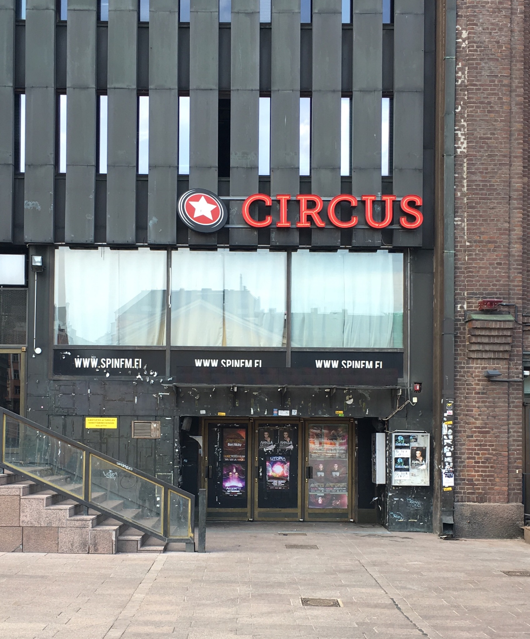 Yökerhon sisäänkäynti